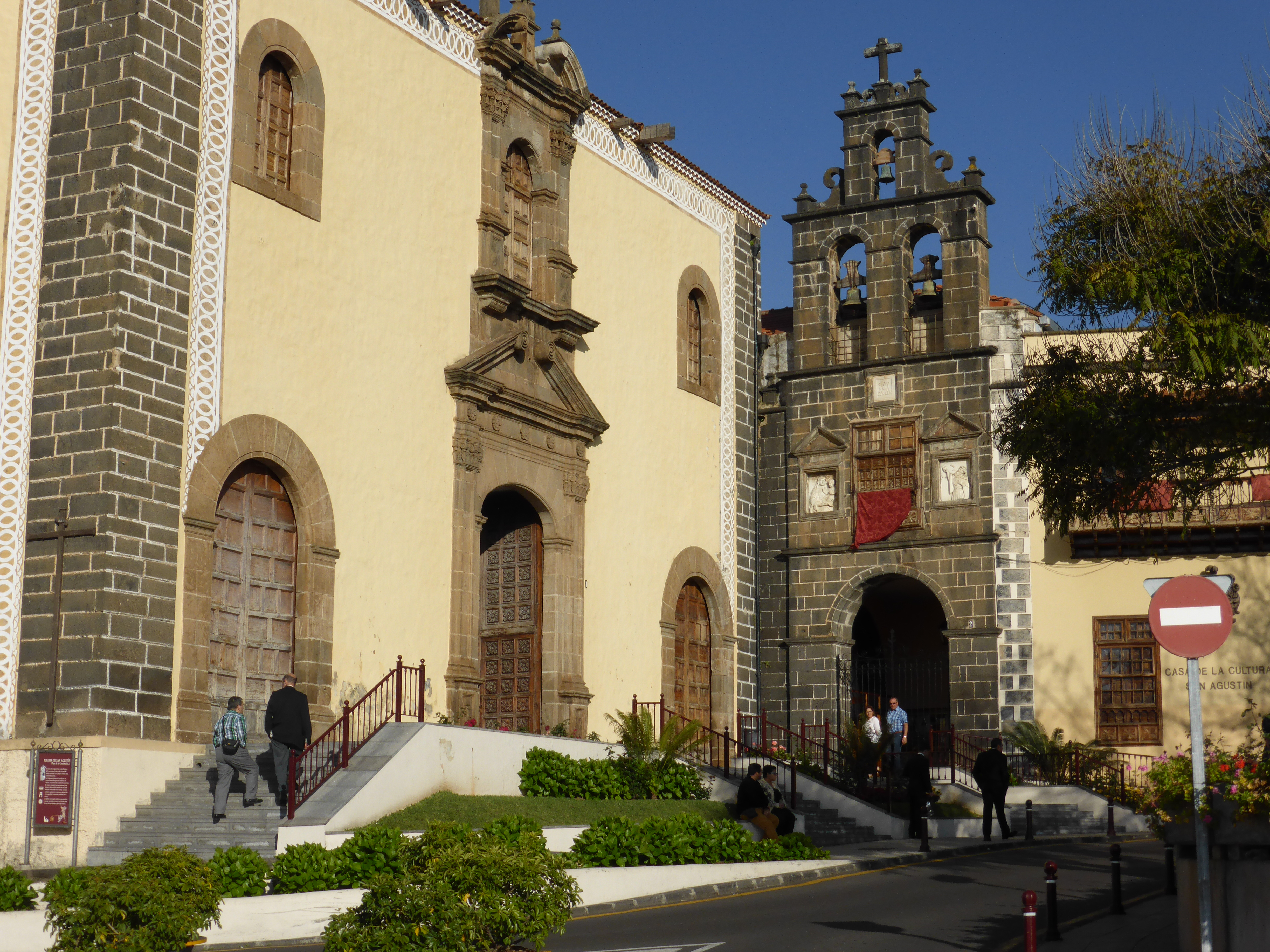 Iglesia de San Agustín, en la plaza de la Constitución, de la villa de La Orotava, en la isla de Tenerife. Esta iglesia perteneció a un antiguo convento de la comunidad agustina. En 1671 empezaron las obras de todo el convento, cuyas fachadas son de cantería en piedra volcánica. La fachada de la iglesia es de estilo barroco.